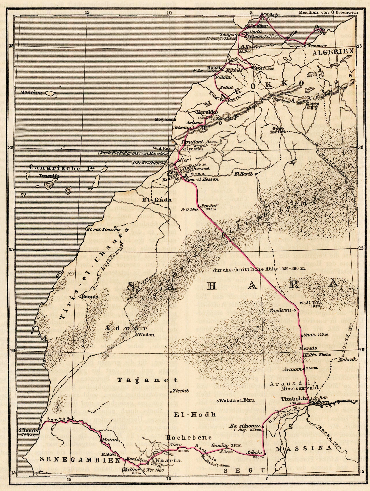 Übersichtsskizze der Reise von Dr. O(skar) Lenz nach Timbuktu 1879-80